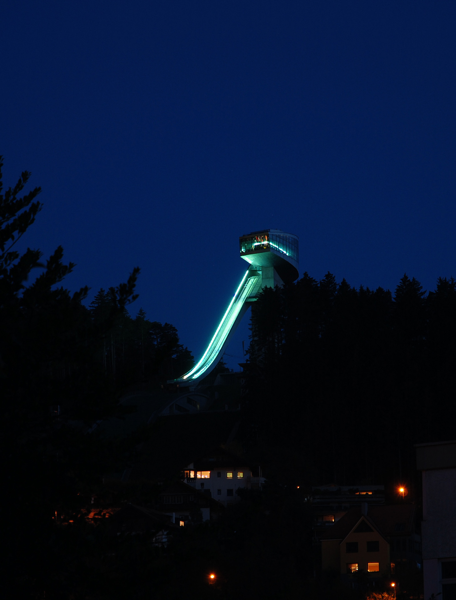 Bergiselschanze, Nachtaufnahme Bergisel Ski Jump by Night vm